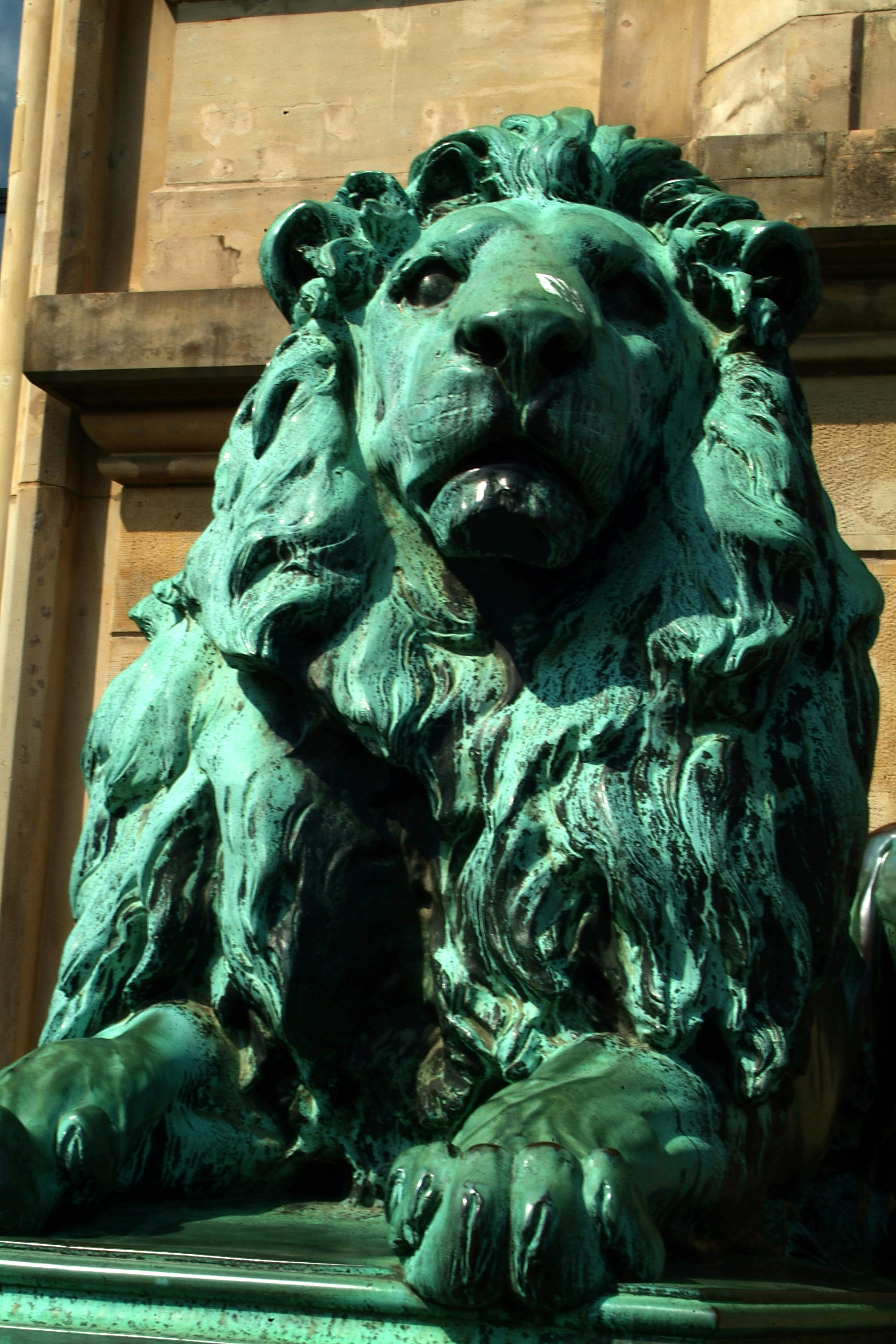 Bronzelöwe von Adolf Rosenthal